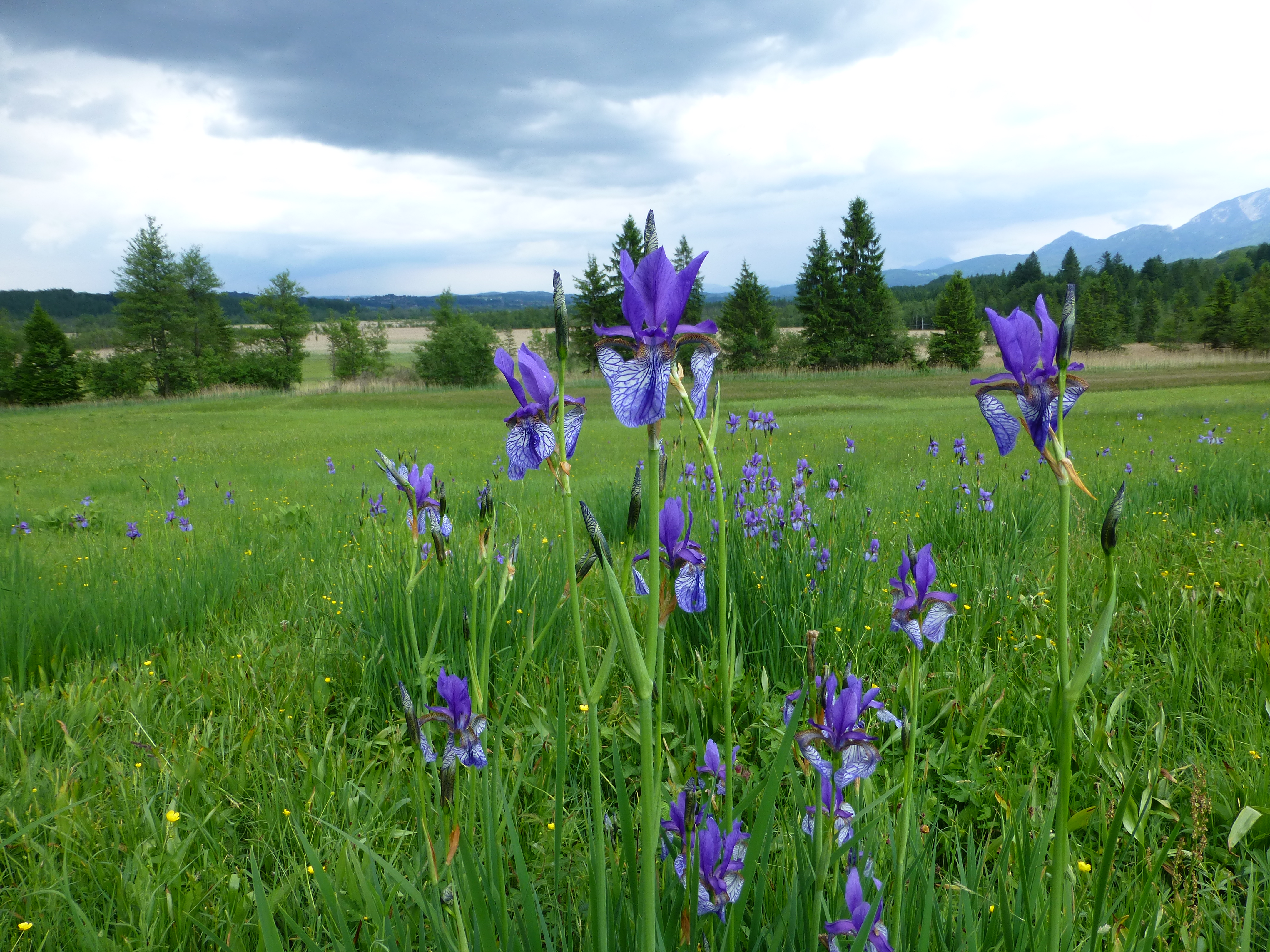 Lilien im Murnauer Moos